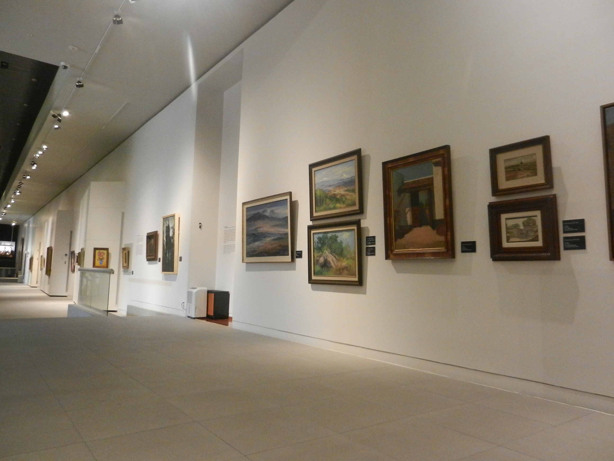 Aspecto del interior de la sala de Cultura Regional del Museo de Arte e Historia de Guanajuato